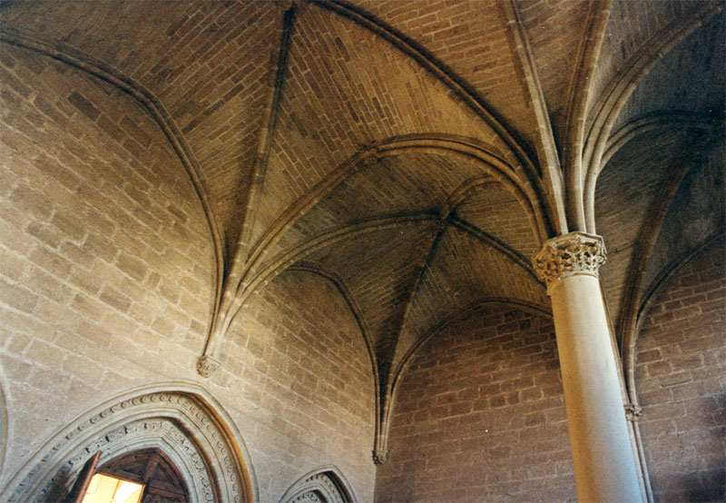 Monestir de Cañas. Sala capitular. La Rioja, Espanya